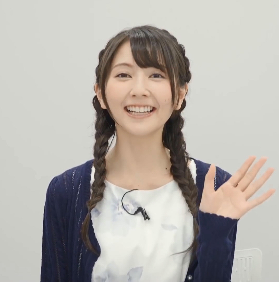 【熱血ファンキル塾 -1】開講決定！いきなりの課題はユニットLv.90！